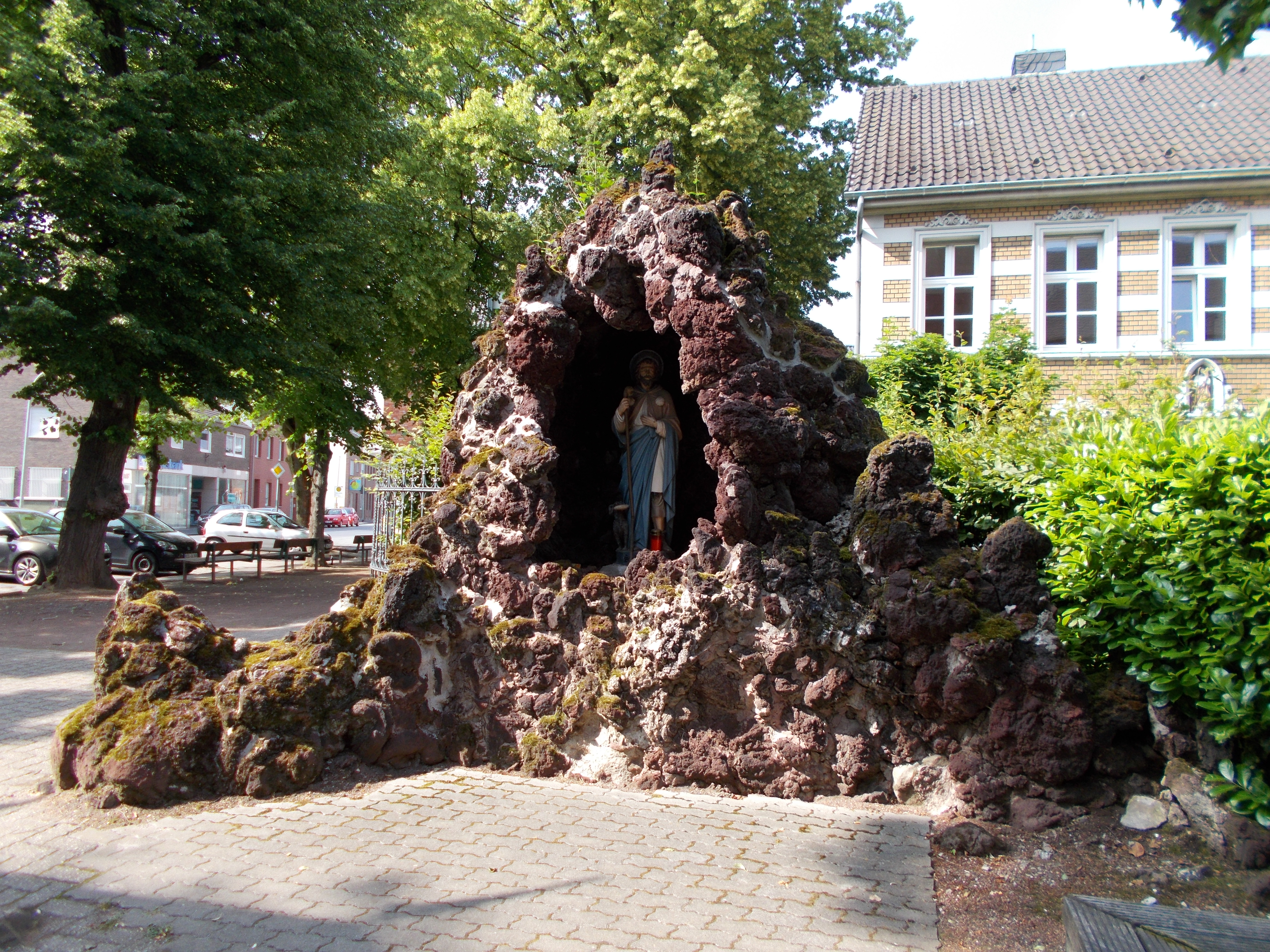 Rochusgrotte am Wallfahrtsort Hehn in Mönchengladbach.